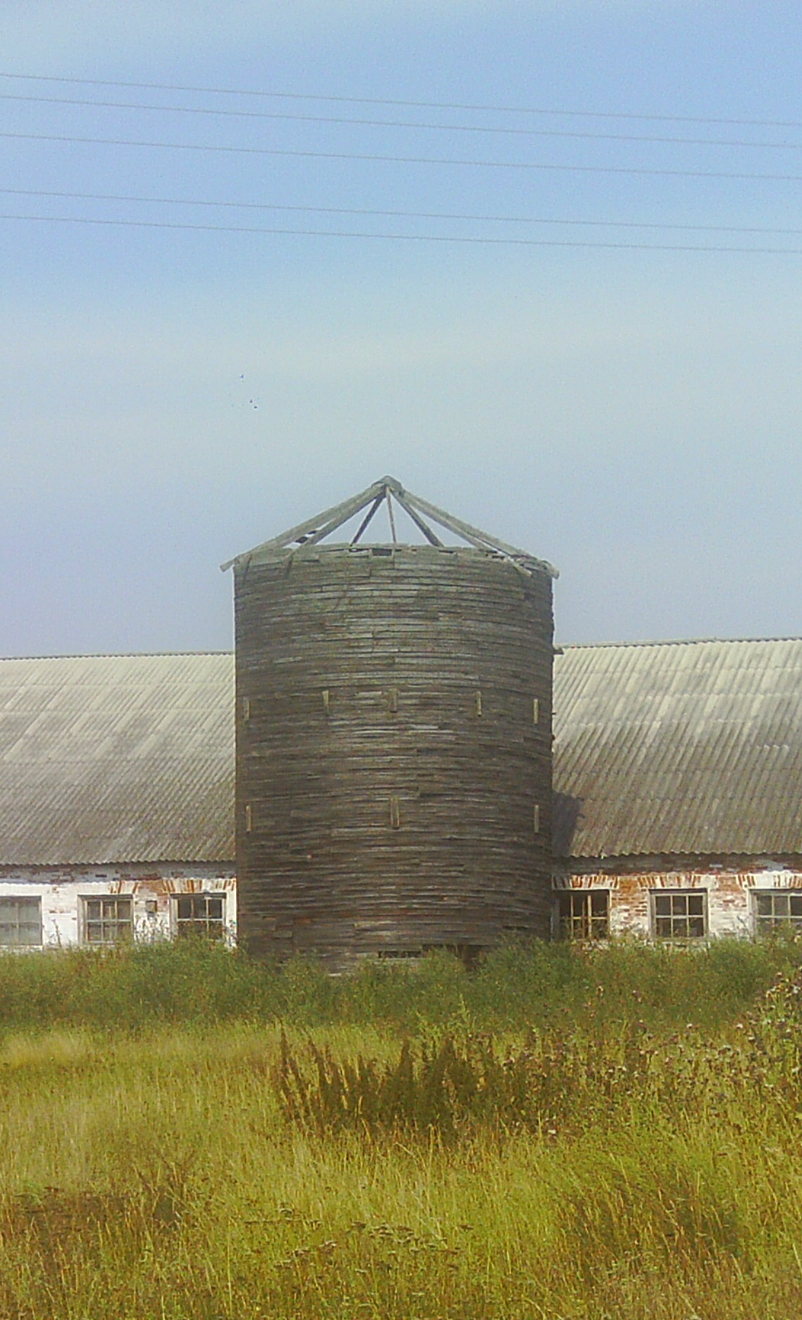 Силосная башня в Слудах